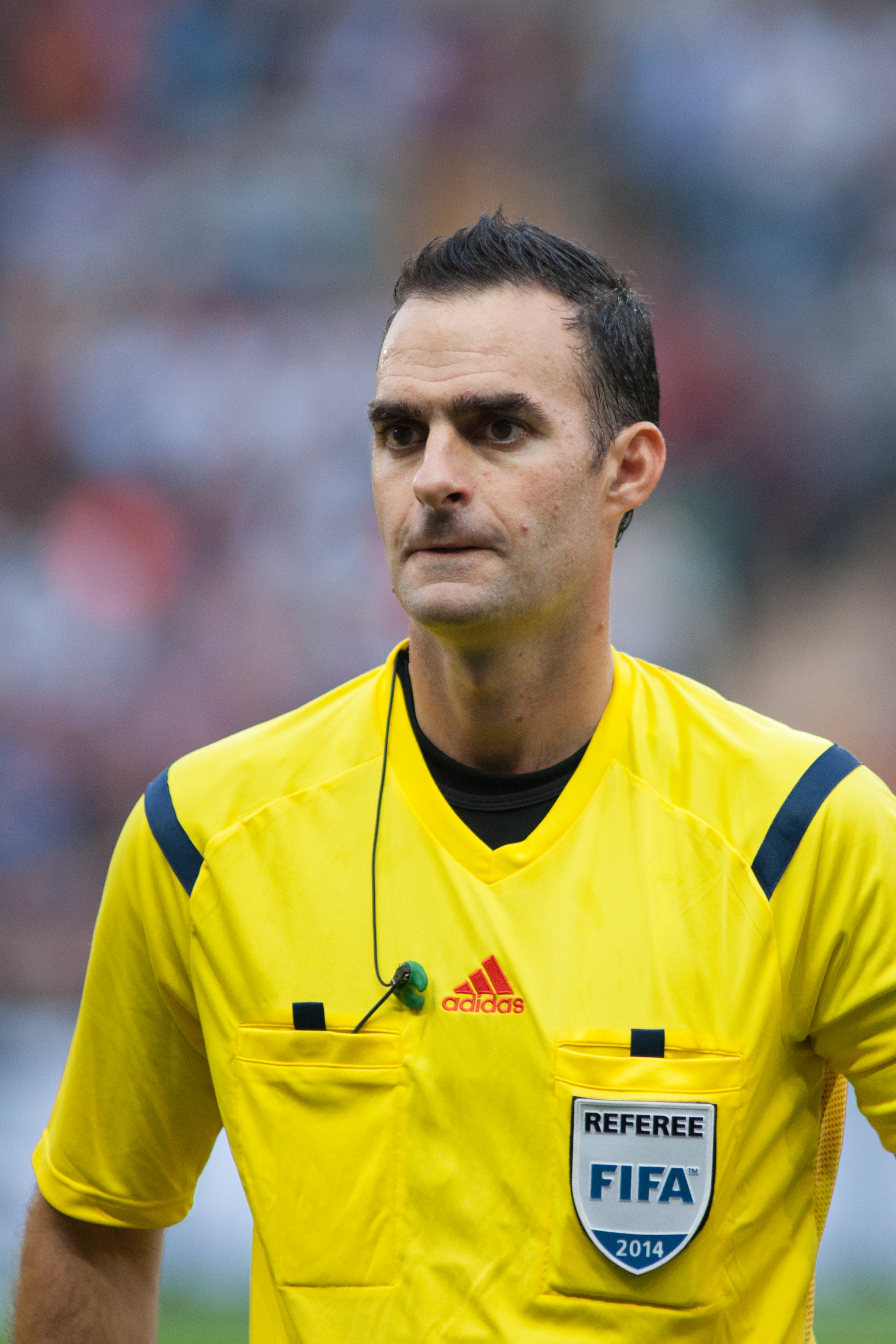 Naples vs Barcelone - Genève - aout 2014 - Stephan Studer